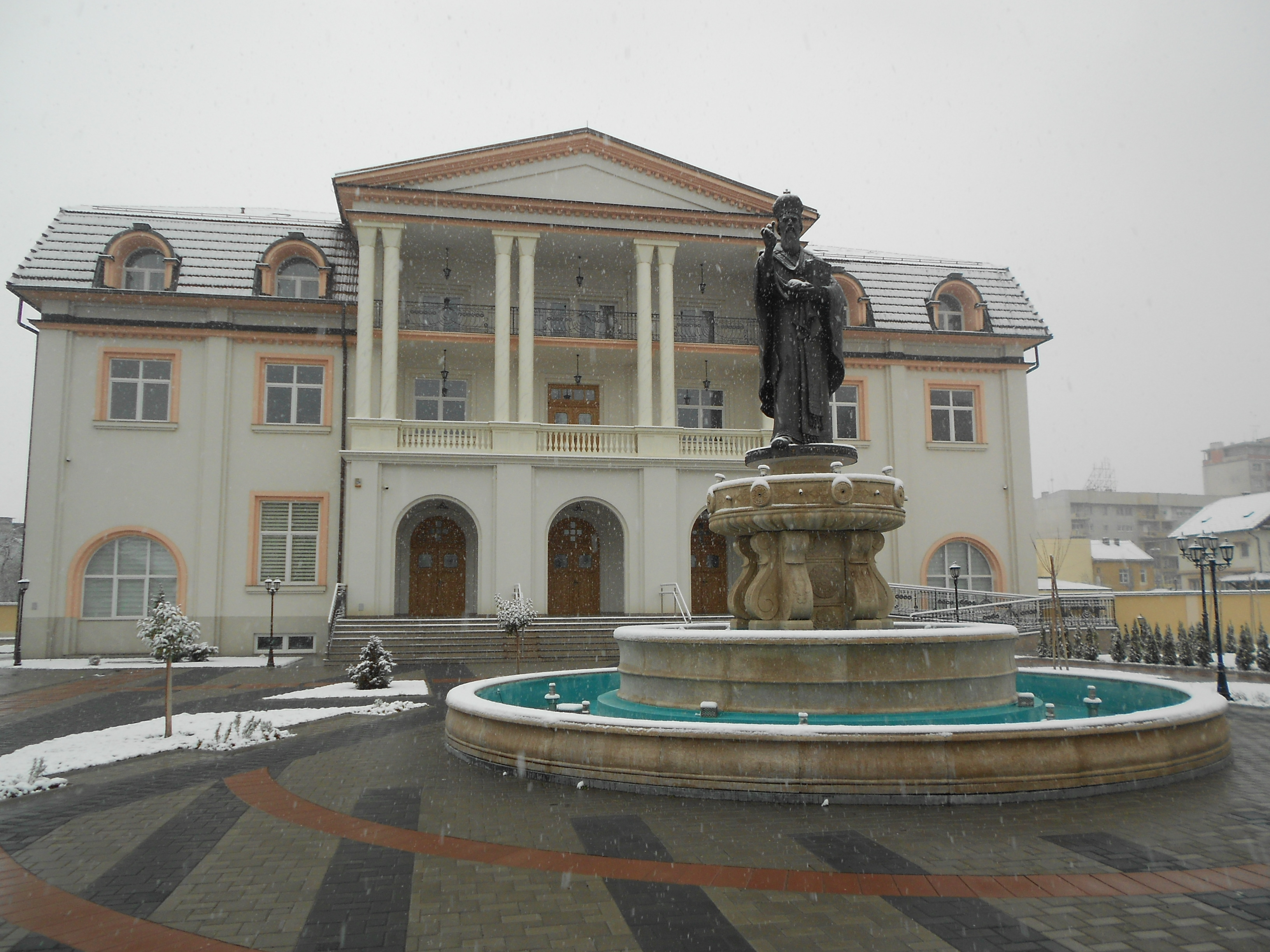 Манастир Светог Василија Острошког